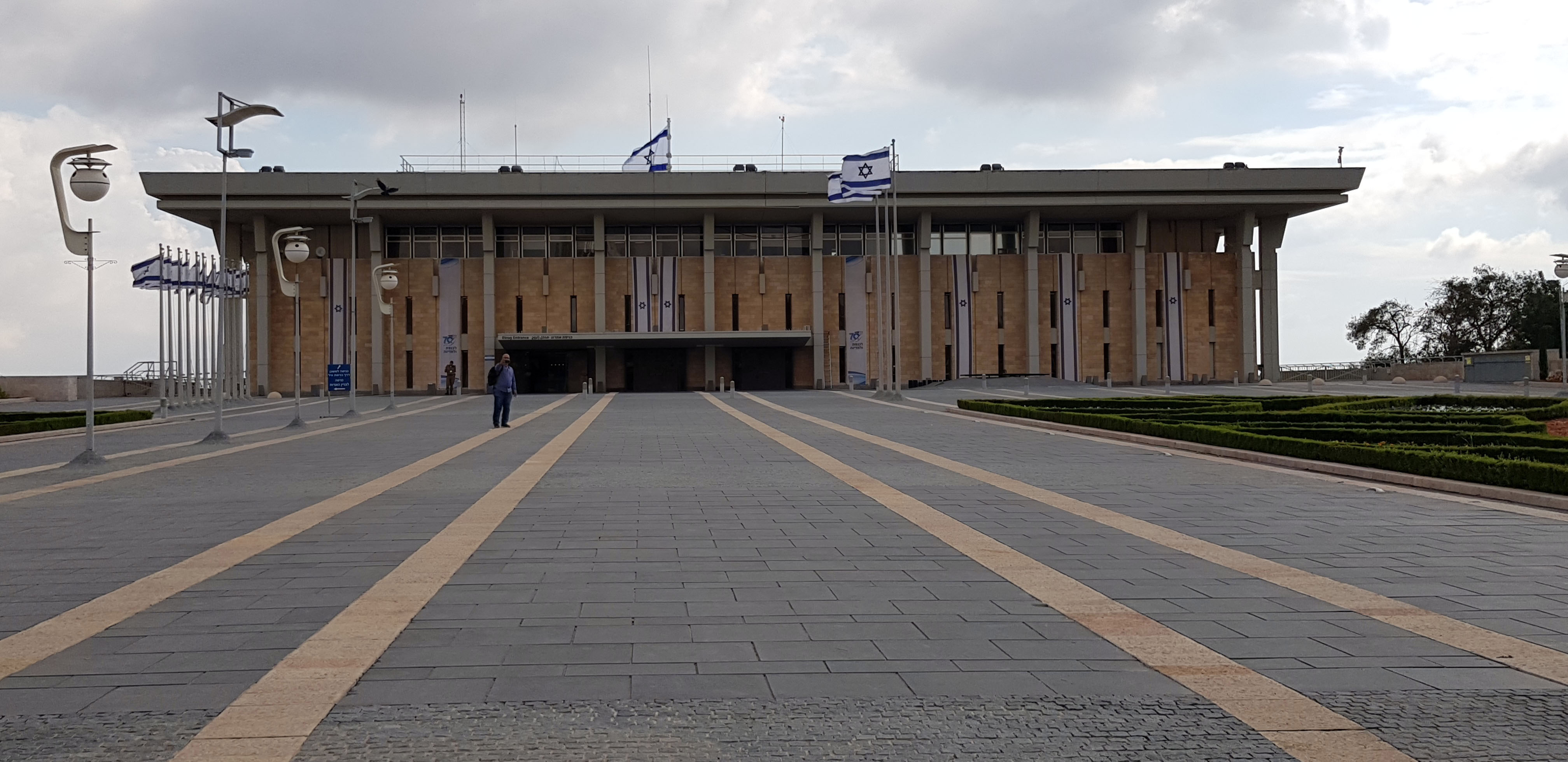 משכן הכנסת, נובמבר 2018